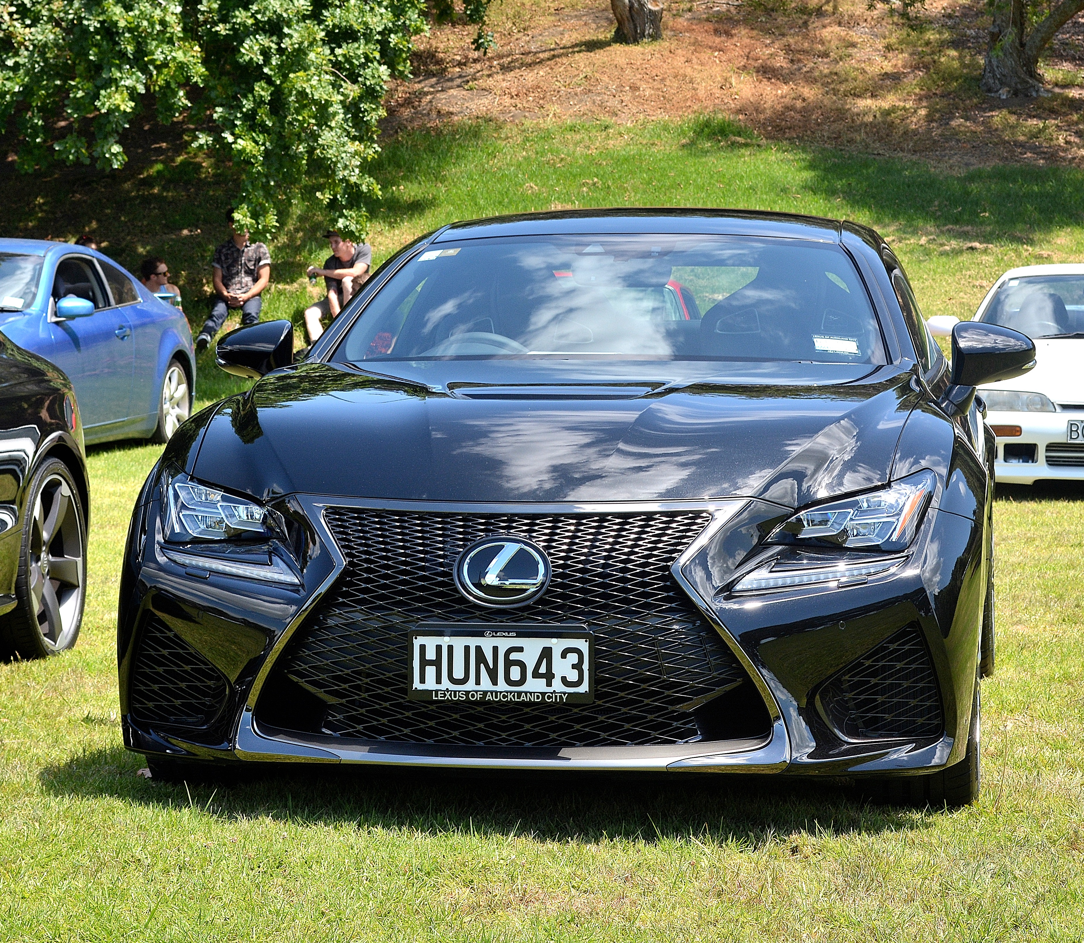 Okahu Bay,Auckland.New Zealand